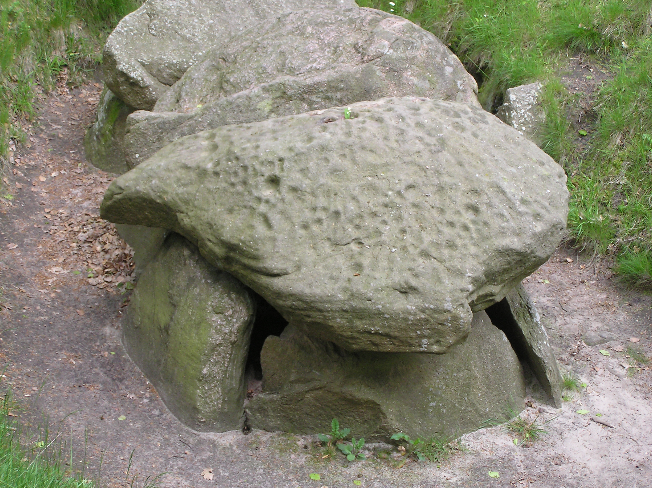 Ansicht des Großsteingrabes mit Schalenstein bei Bunsoh in Dithmarschen Blick auf den Schalenstein